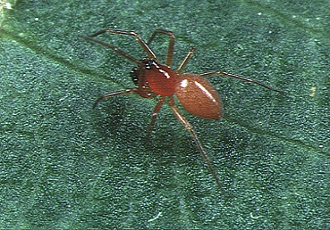 male [Entelecara tanikawai[ from Okinawa.